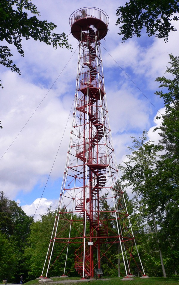 Büchenbronner Aussichtsturm